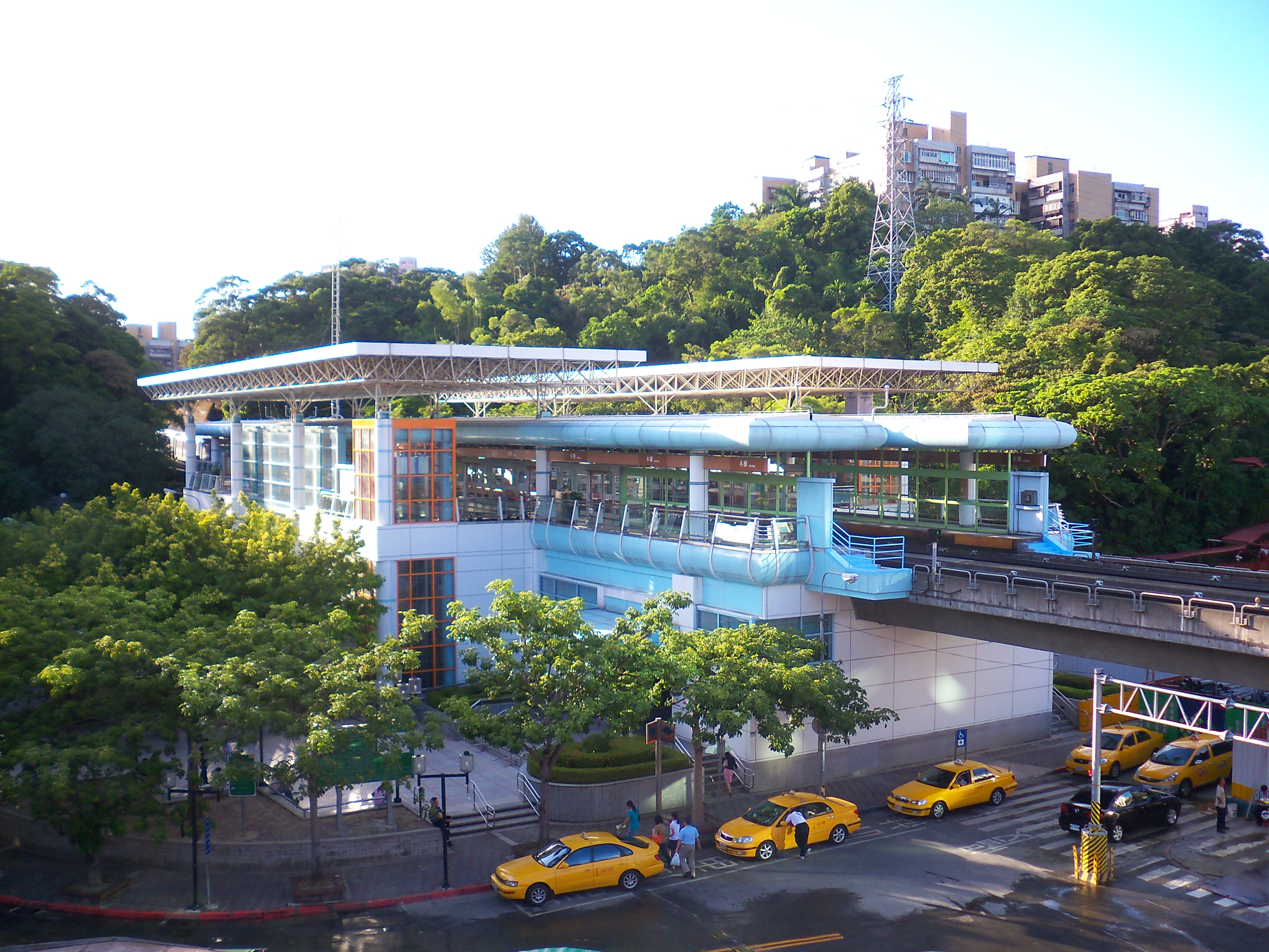 台北捷運文山線木柵駅駅舎。